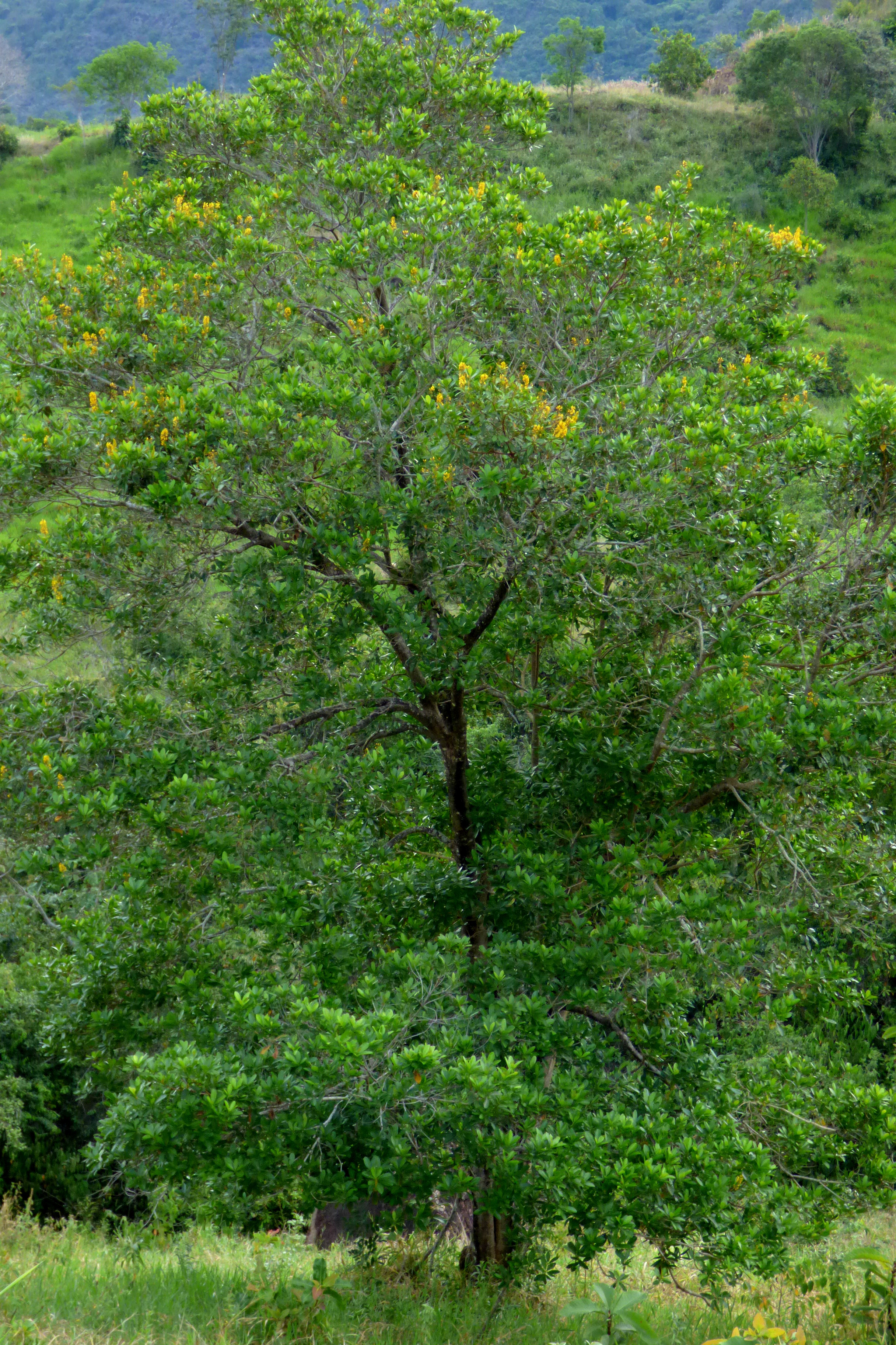 Árbol de cenescudo (Vouchysia ferriginea) en Colombia.